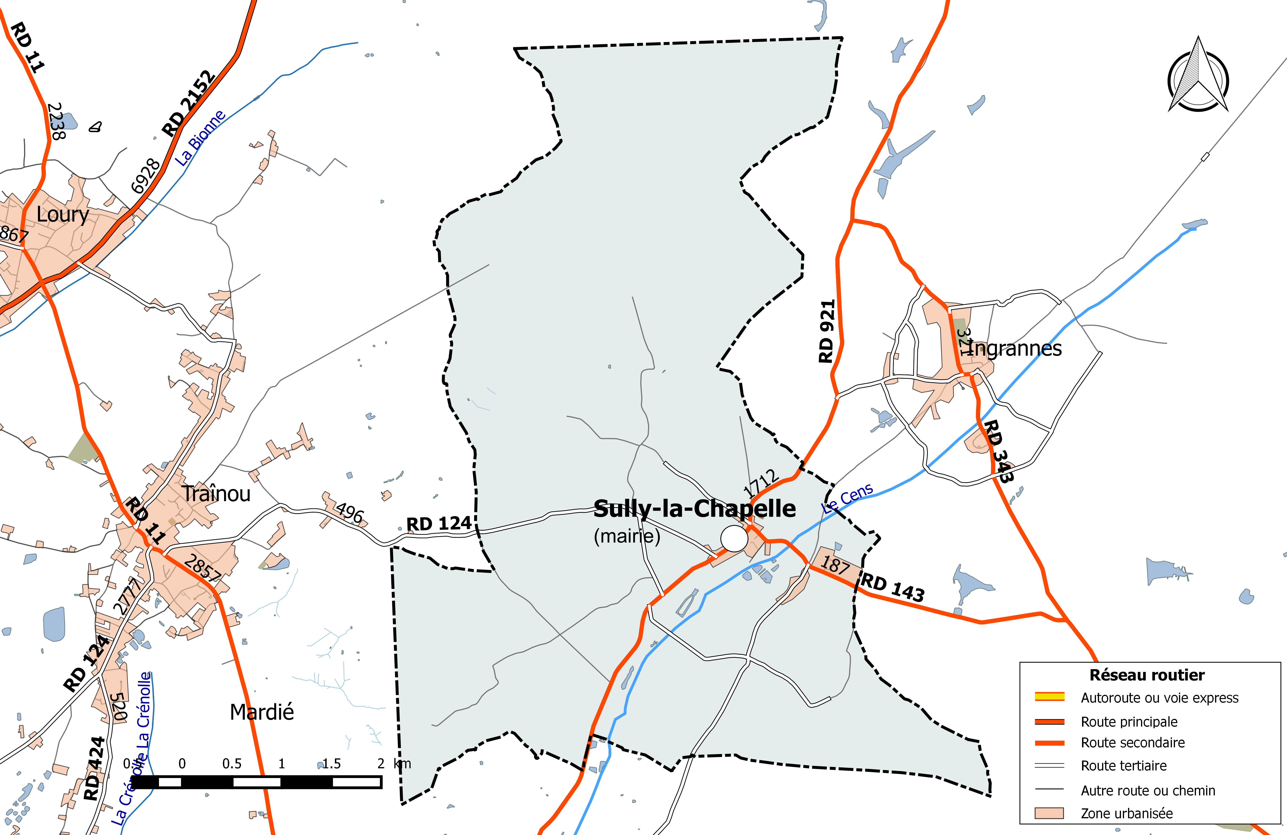 Carte du réseau routier de la commune de Sully-la-Chapelle.